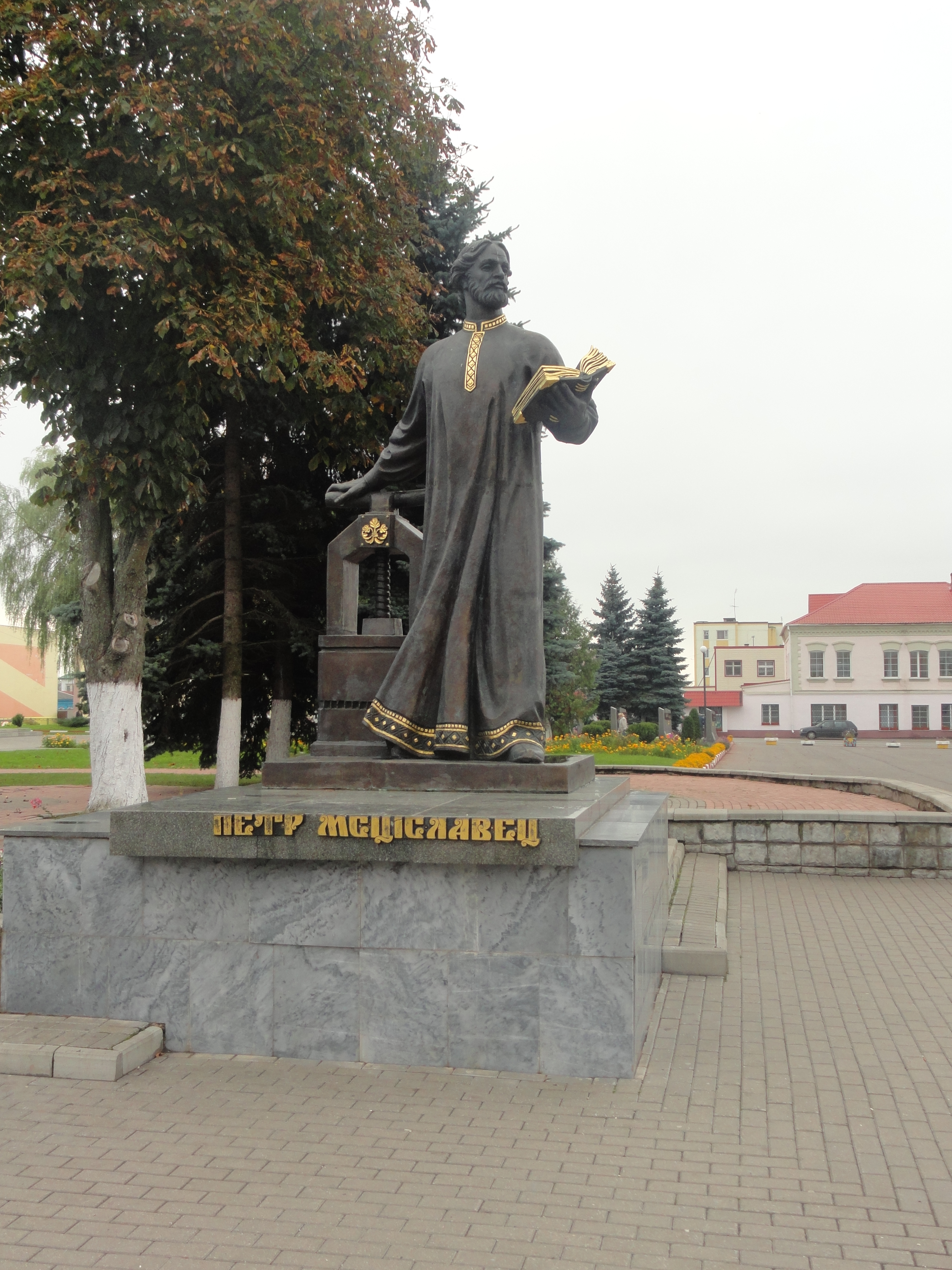 Памятник Петру Мстиславцу в Мстиславле